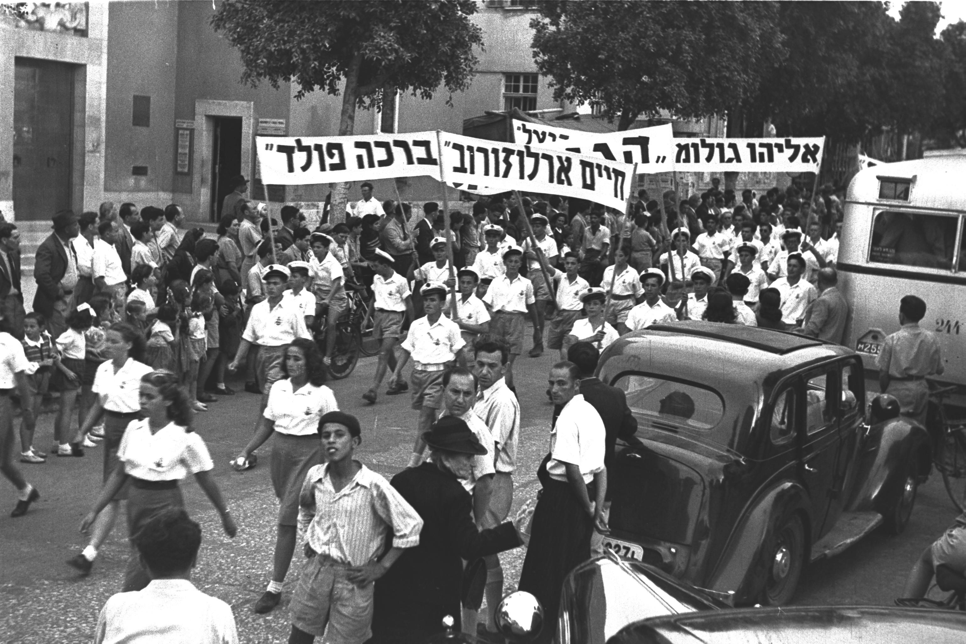 Workers belonging to youth organizations carry banners with names of labor leaders during the May Day Parade in Tel Aviv. פועלים השייכים לתנועות הנוער צועדים ברחובות תל אביב ומחזיקים שלטים עם שמותיהם של מנהיגי תנועות הפועלים במצעד האחד במאי